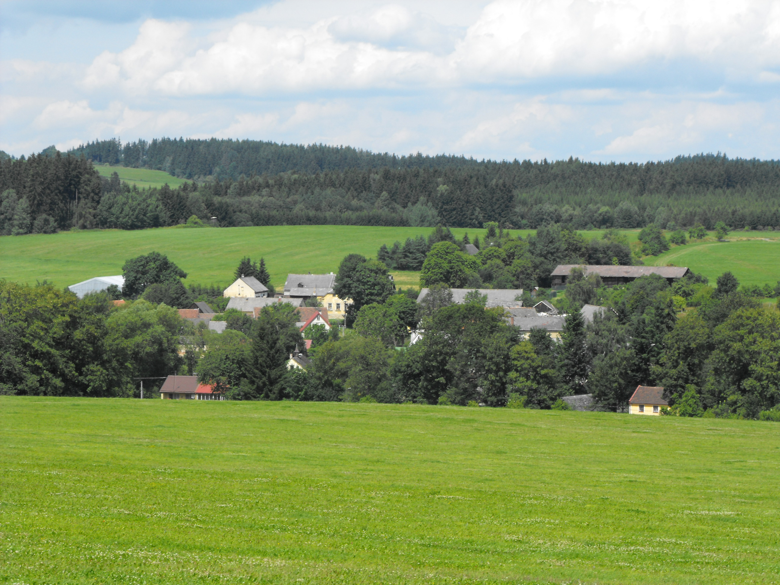 Staré Sedlo, pohled z vrchu Kázek